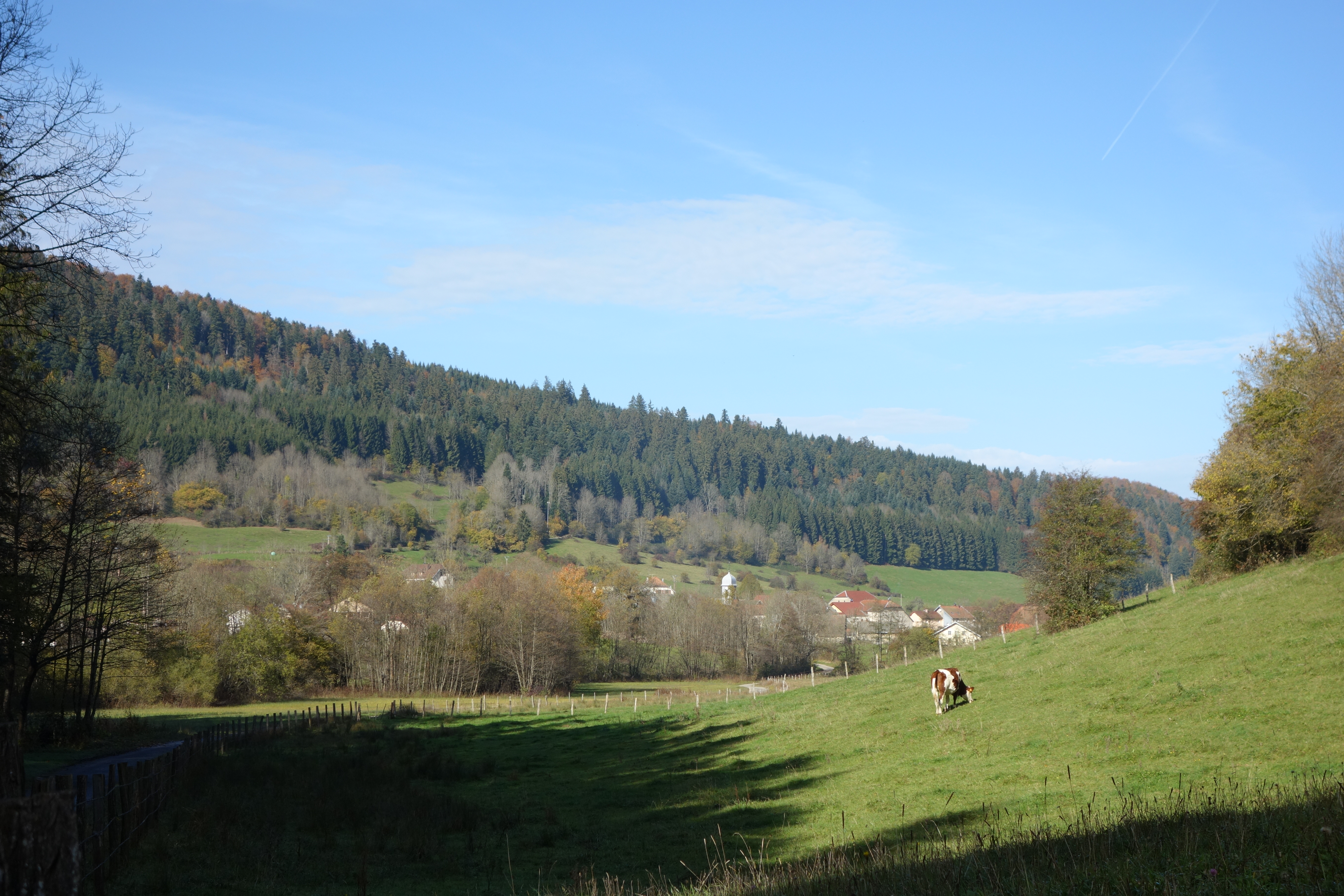 Village des Nans (Jura) dans sa combe